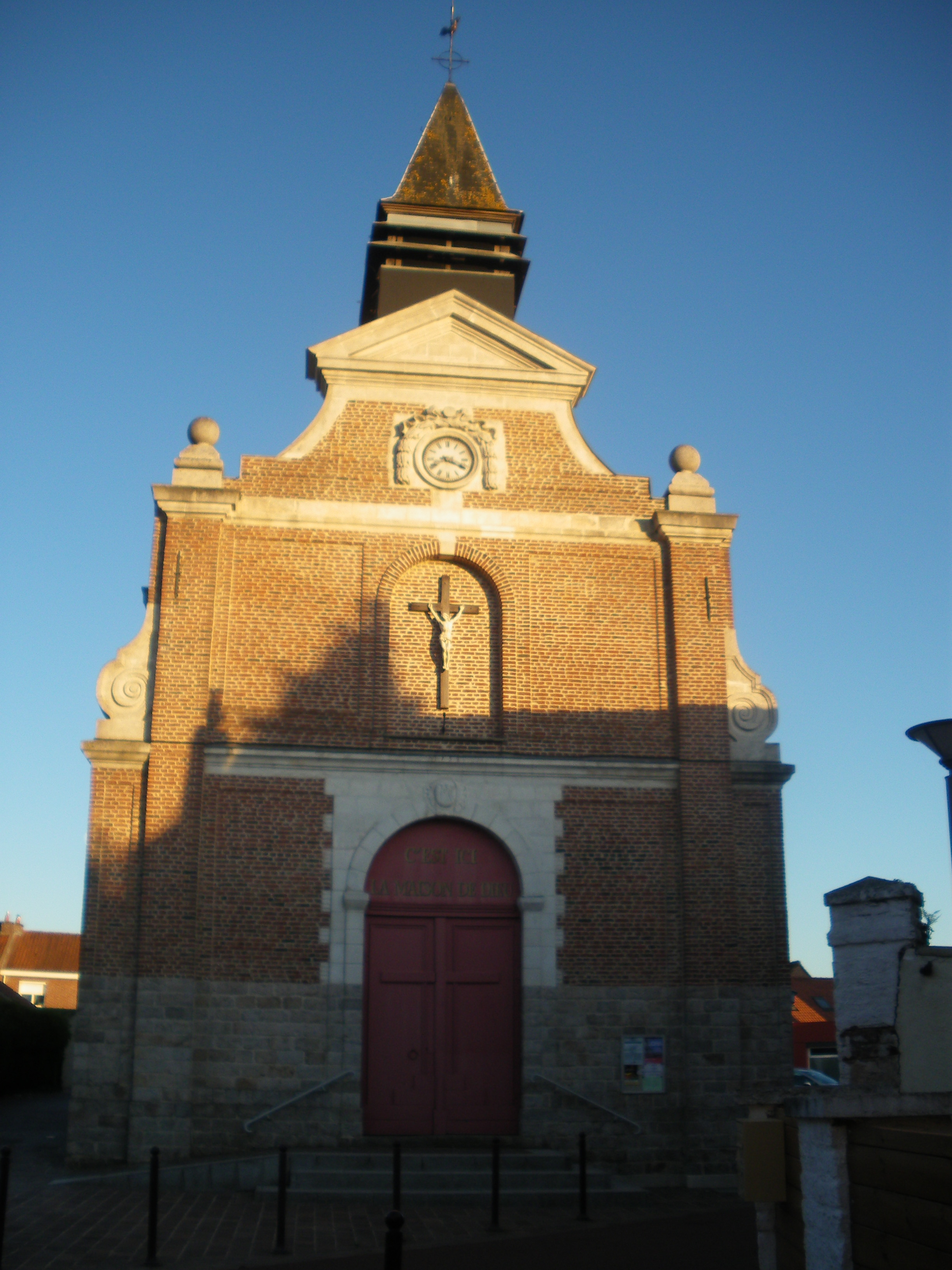 Vue de l'église de Don dans le département du Nord.